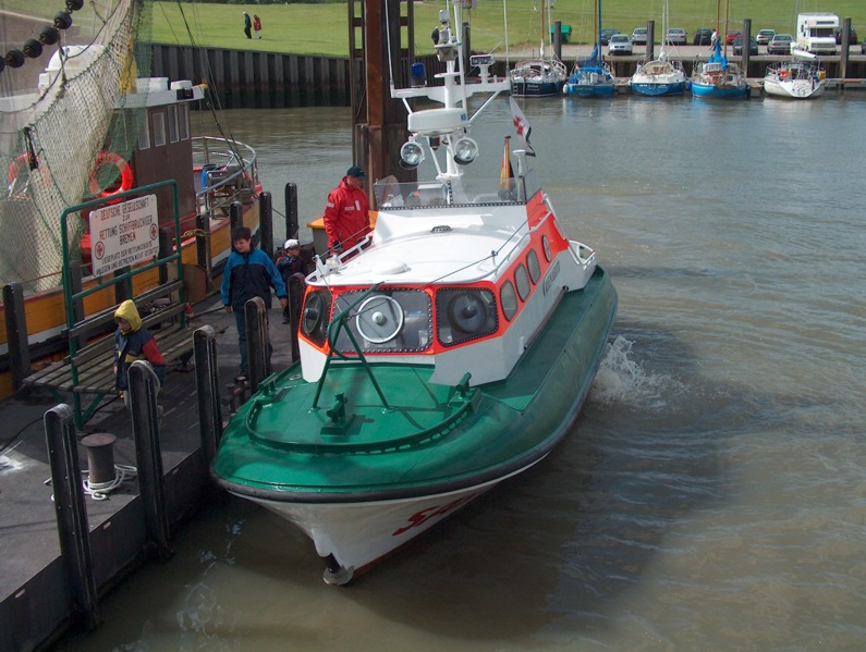 SRB der DGzRS Wilhelm Hübotter, Station Horumersiel